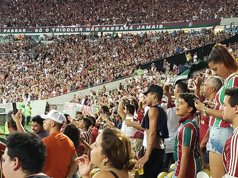 Torcida do Fluminense no empate do clube por 0 a 0 em 4 de dezembro de 2019, perante 39.965 torcedores durante a partida.